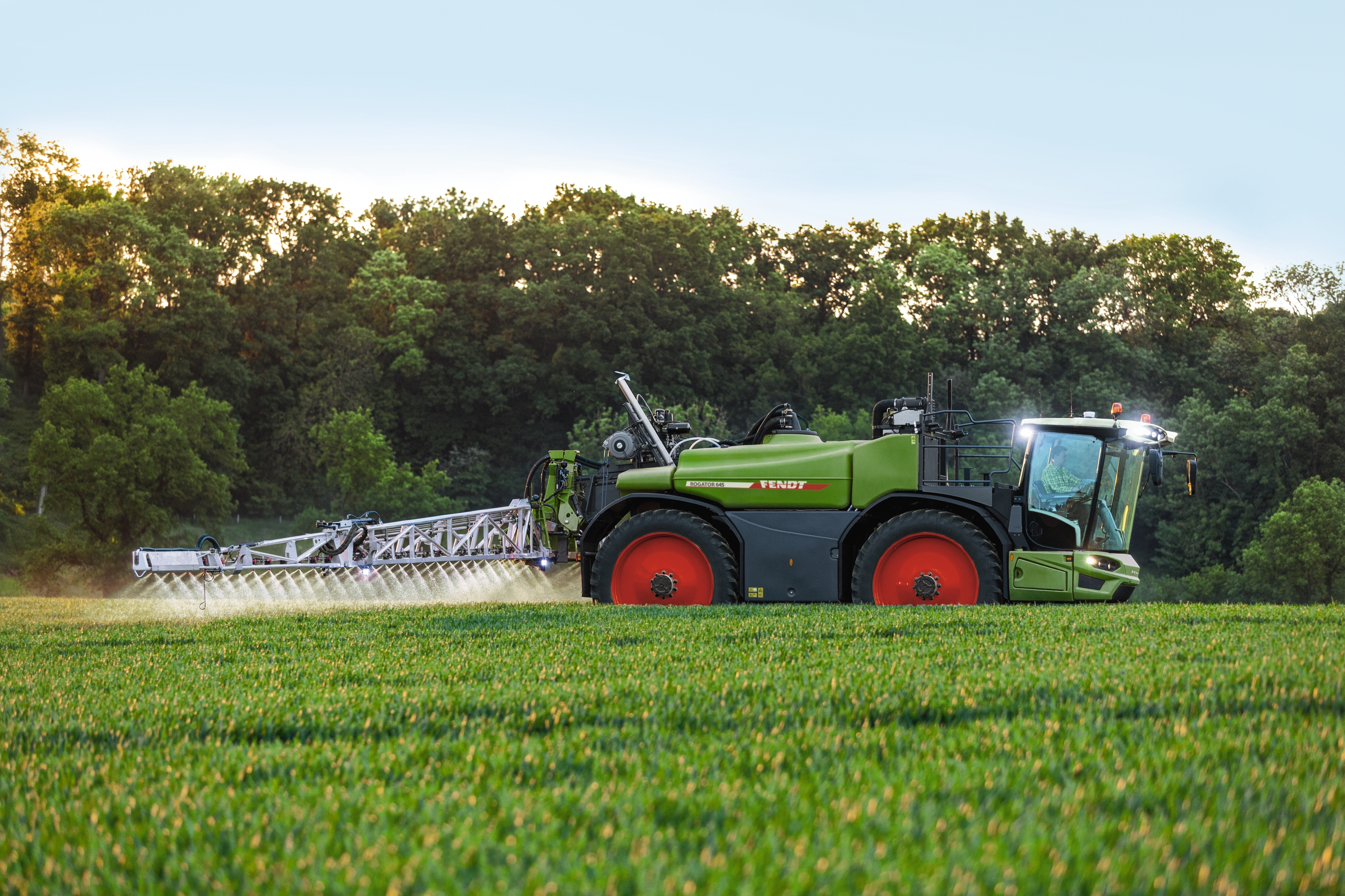 Fendt Rogator 645